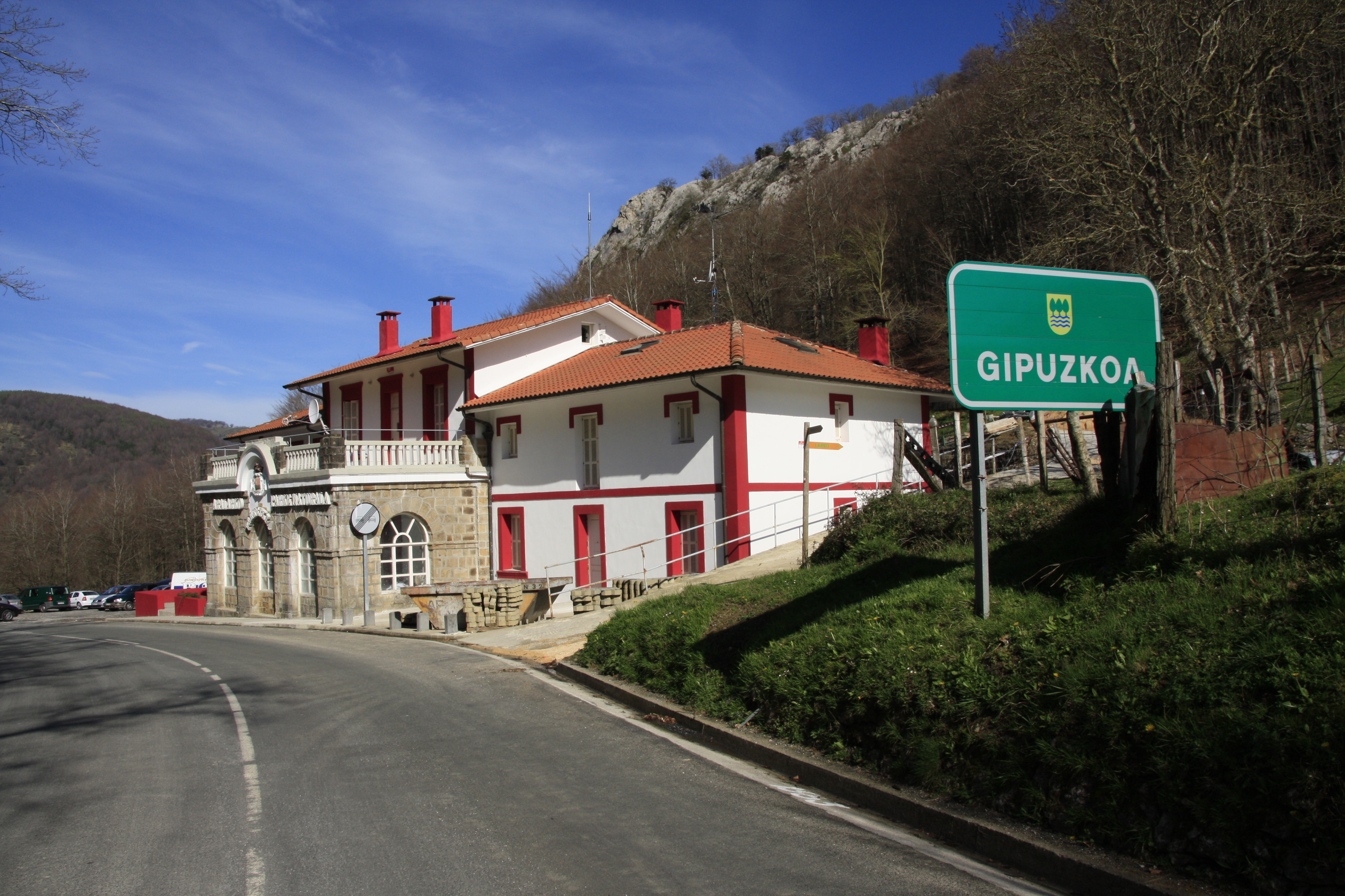 Aralarko Parke Naturaleko parketxeko informazio bulegoa eta Gipuzkoako sarrera adierazten duen seinalea. Bere garaian Gipuzkoako Foru Aldundiko jabetza izan zen eraikina. Info gehiago